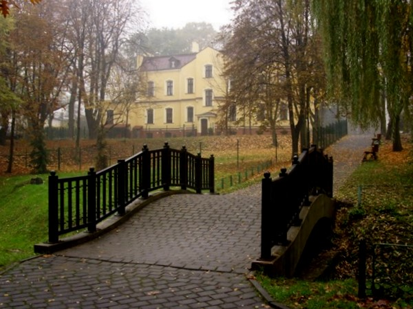 Park Dąbrówka w Jastrzębiu-Zdroju